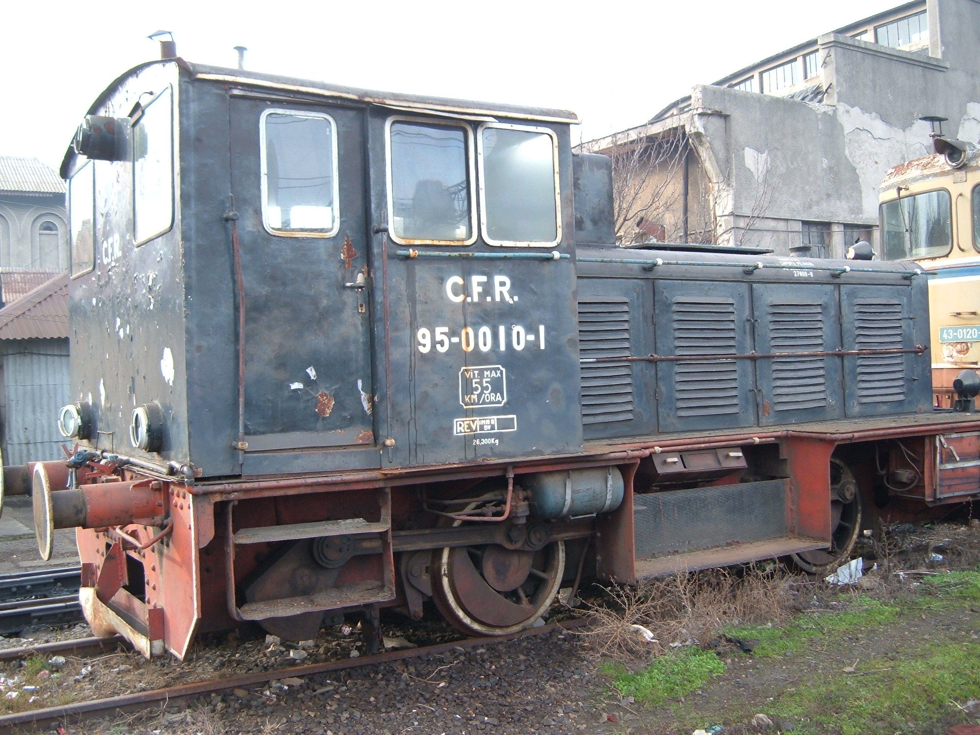 Locomotiva CFR clasa 95